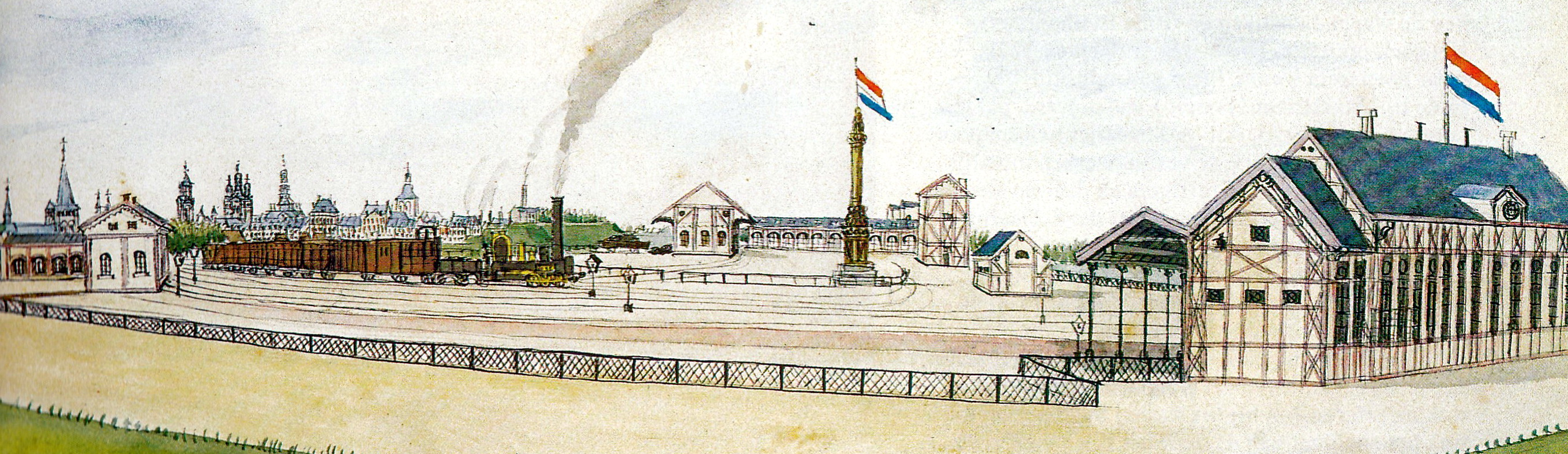 Gekleurde tekening van Philippe van Gulpen van het spoorwegemplacement van de Aken-Maastrichtse Spoorwegmaatschappij en het eerste station van Maastricht in 1854. Het station was gebouwd van hout (in chaletstijl) om snel te kunnen worden afgebroken (het lag in de vestingwerken). Het station bestond slecht drie jaar (1853-56), omdat het in de weg stond van de nieuwe spoorlijn naar Hasselt. Van links naar rechts: de rijtuigenloods met dubbelwoning van de stationschef en de ingenieur-werktuigkundige, een locomotief met ruituigen, een zuilvormig monument (waar niets over bekend is), daarachter de goederen- en locomotievenloods (met hogere watertoren), de cokesloods, en het stationsgebouw. Collectie RHCL Maastricht.